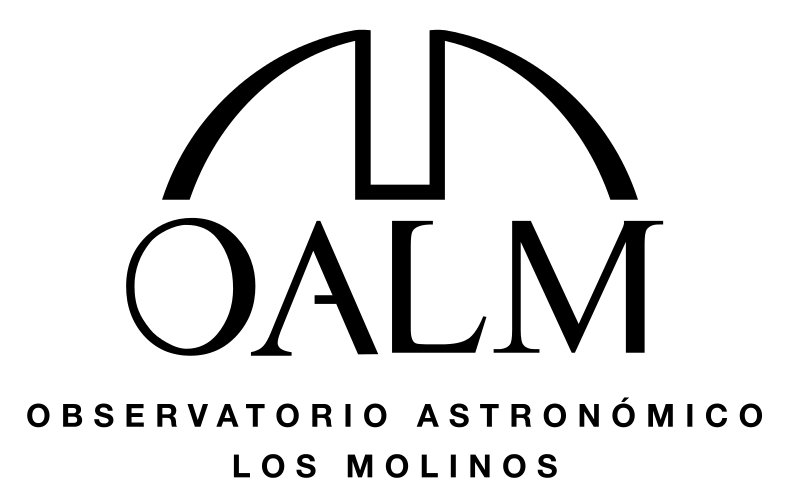 Logo oficial del OALM